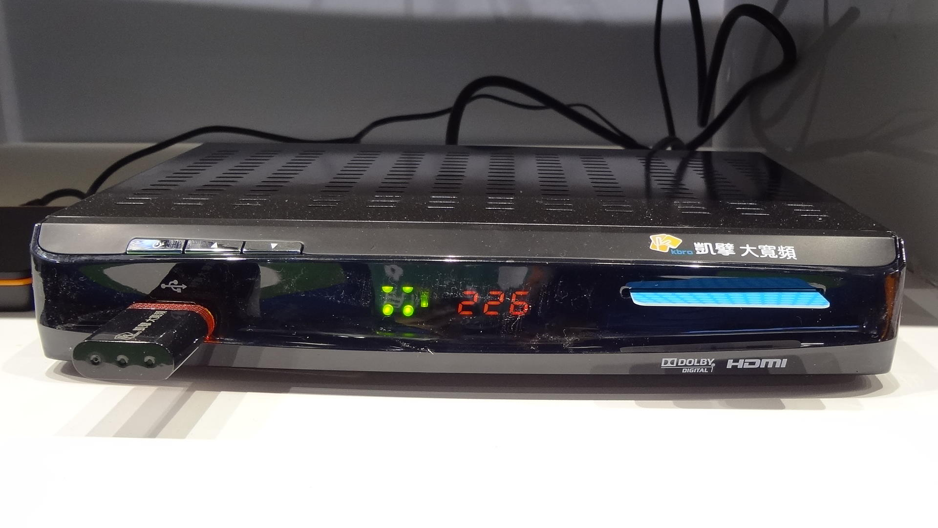 2013年資訊月，凱擘展示的SuperMOD機上盒